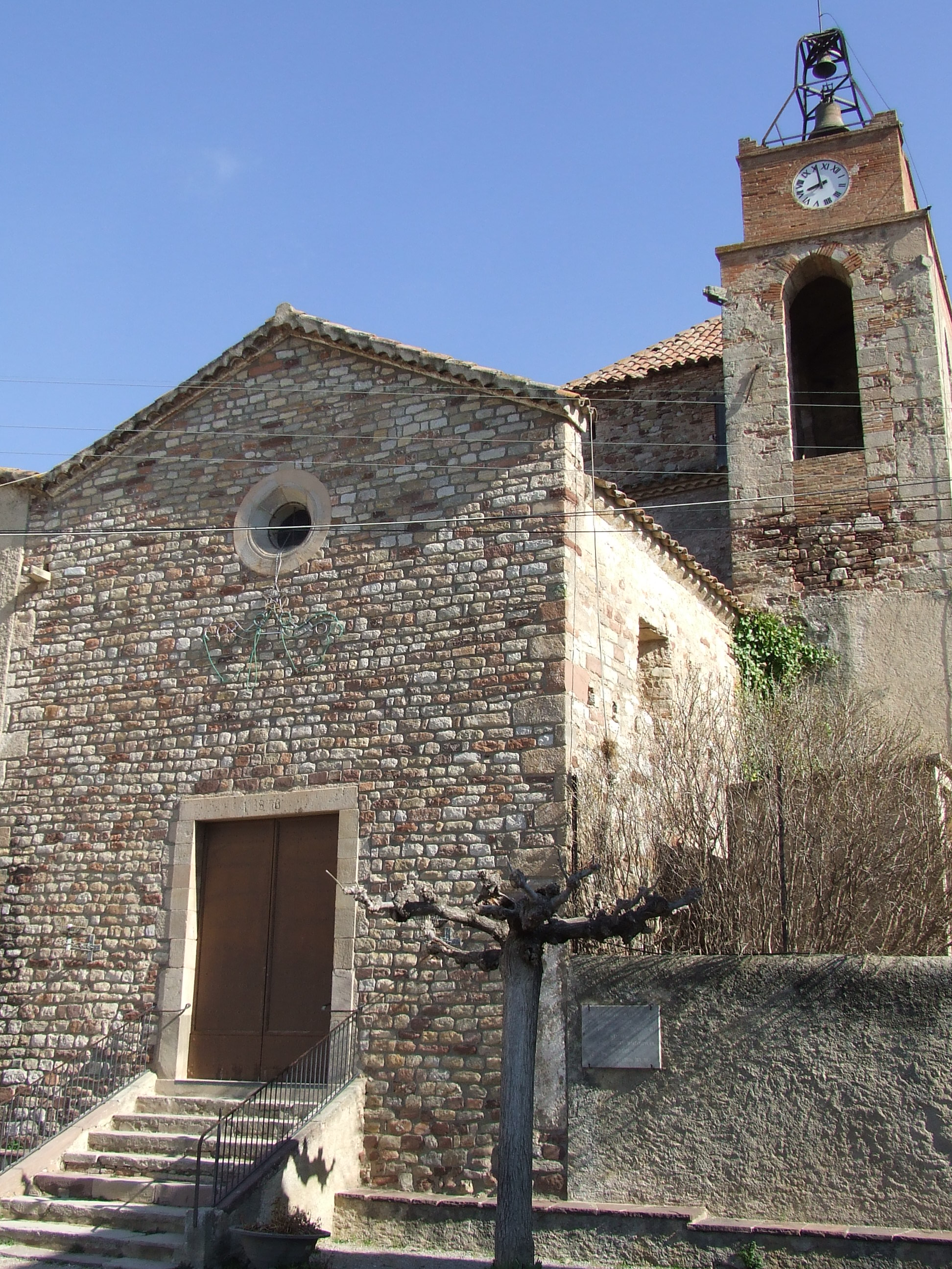 Sant Pere de Bigues, façana romànica (Bigues, Bigues i Riells, Vallès Oriental)